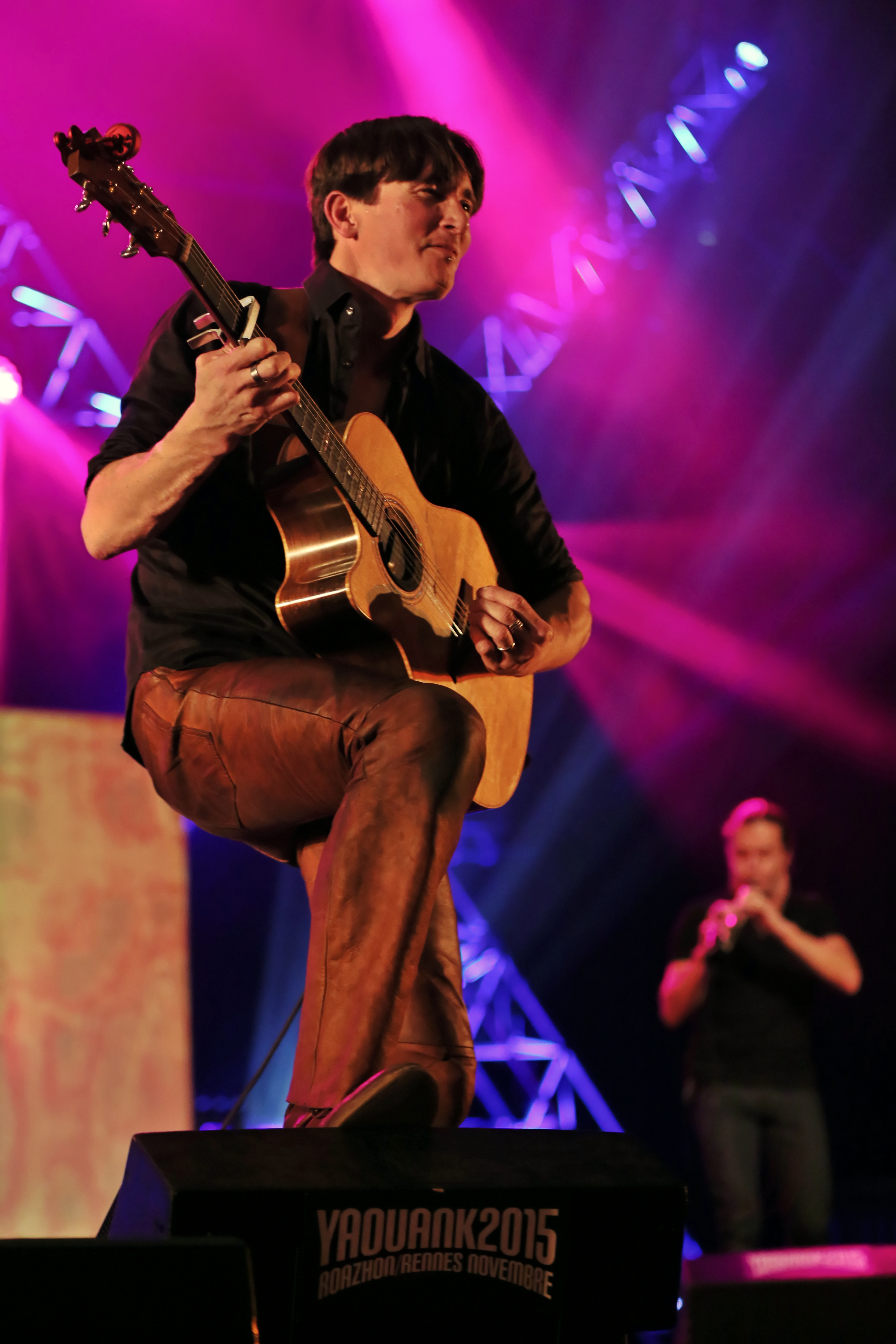 Plantec en fest-noz lors du festival Yaouank le 21 novembre 2015 au Parc des Expositions de Rennes.